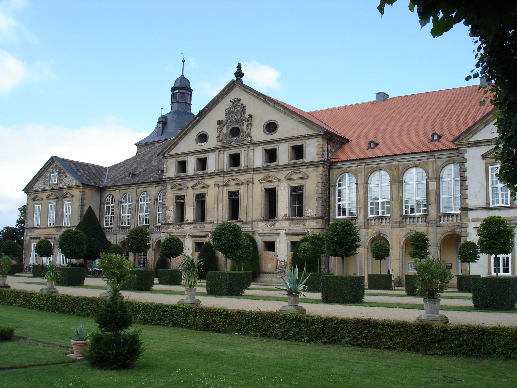 Schloss Hundisburg in Haldensleben